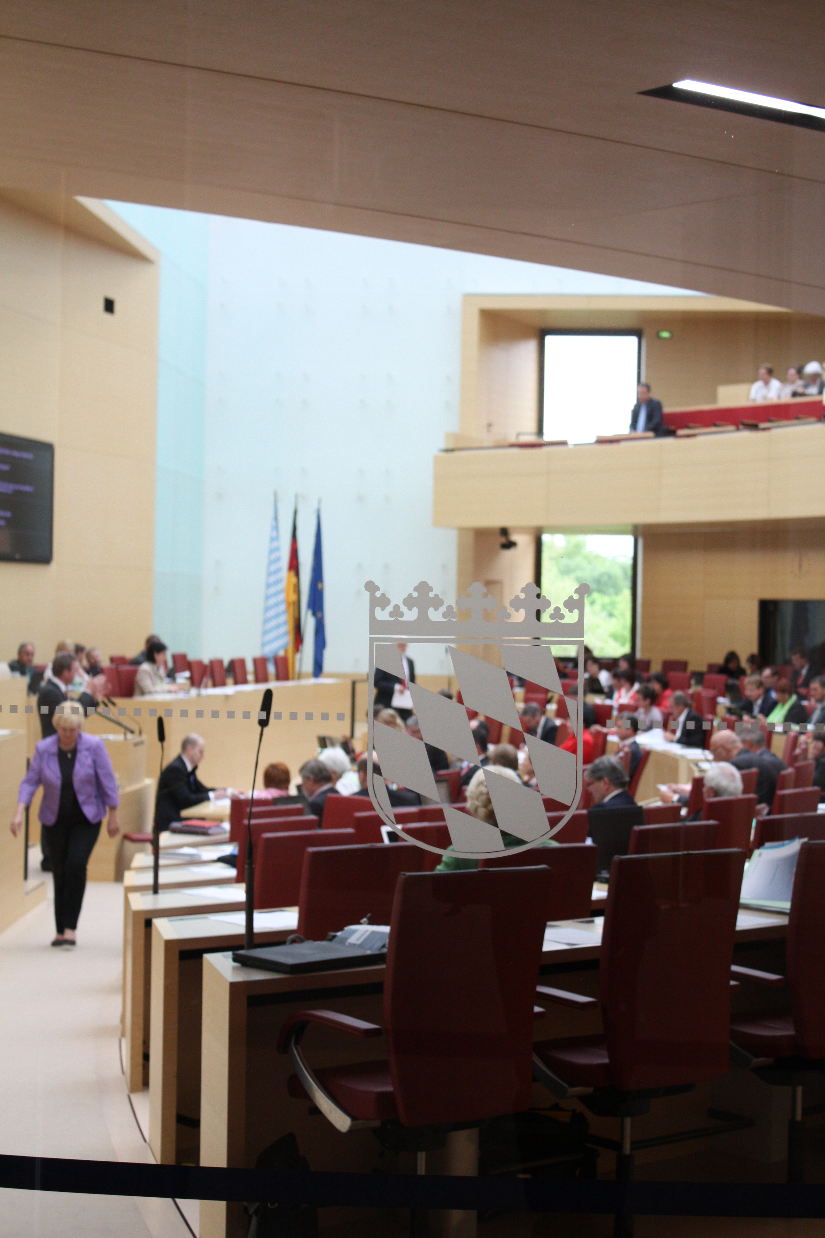 Sitzung des Bayerischen Landtags